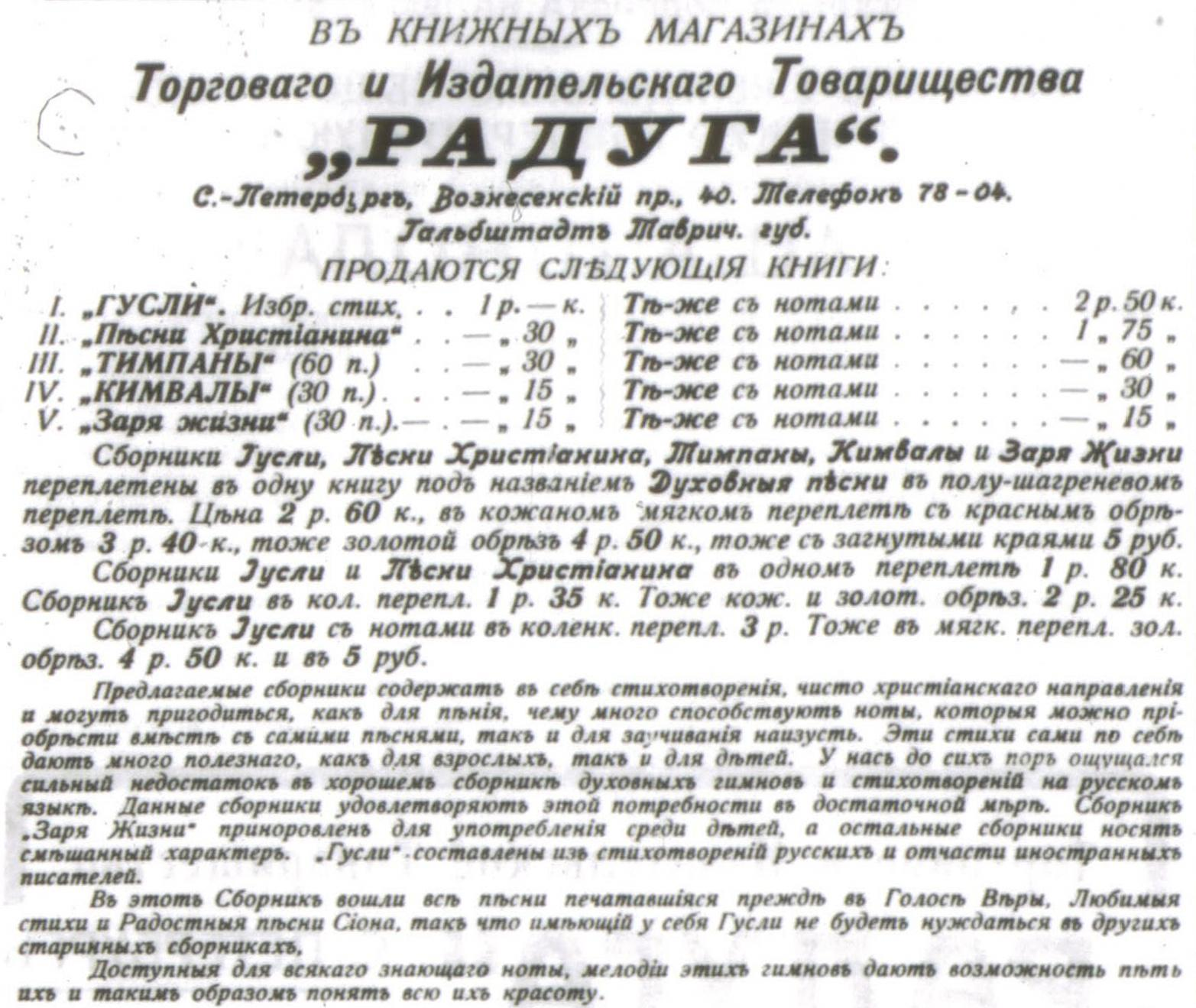 Реклама продукции христианского издательства "Радуга" в газете "Утренняя Звезда", 1908 год